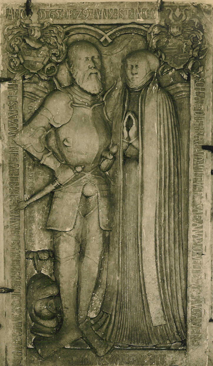 Grabstein für Valentin von Alvensleben und Anna von Veltheim in der Nicolaikirche in Gardelegen, Sachsen-Anhalt